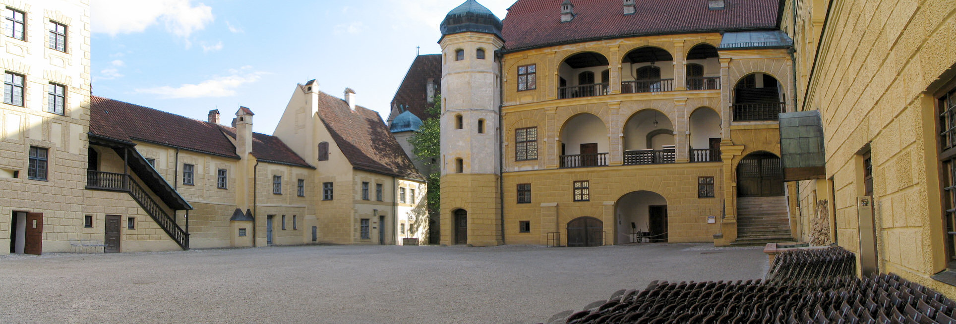 Burg Trasnitz Lanndshut - Bavaria - Germany - Innenhof